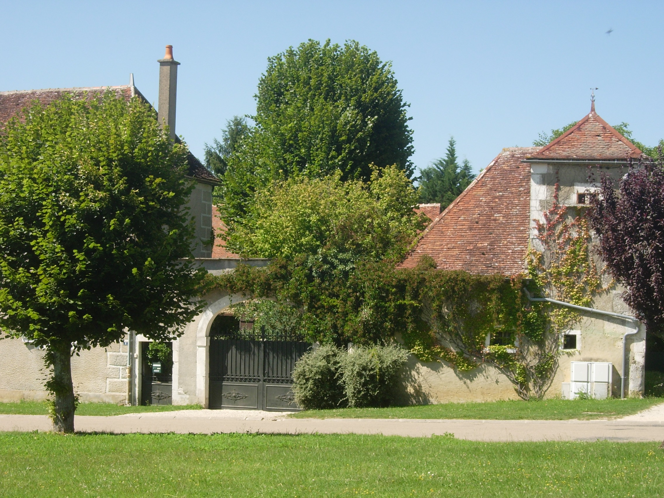 Lignières (Aube)